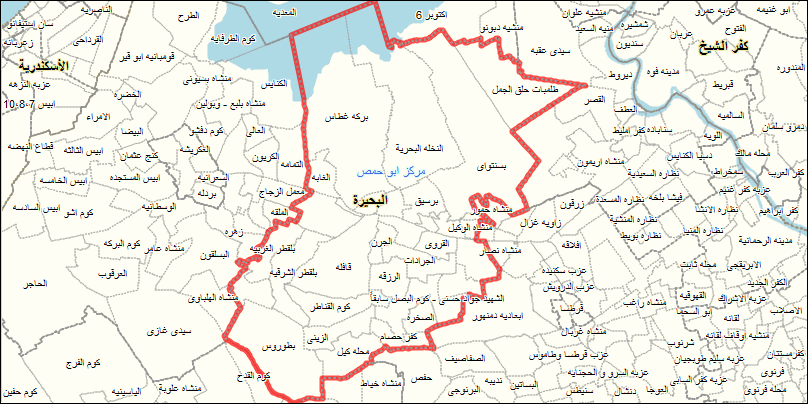 خريطة مركز أبو حمص